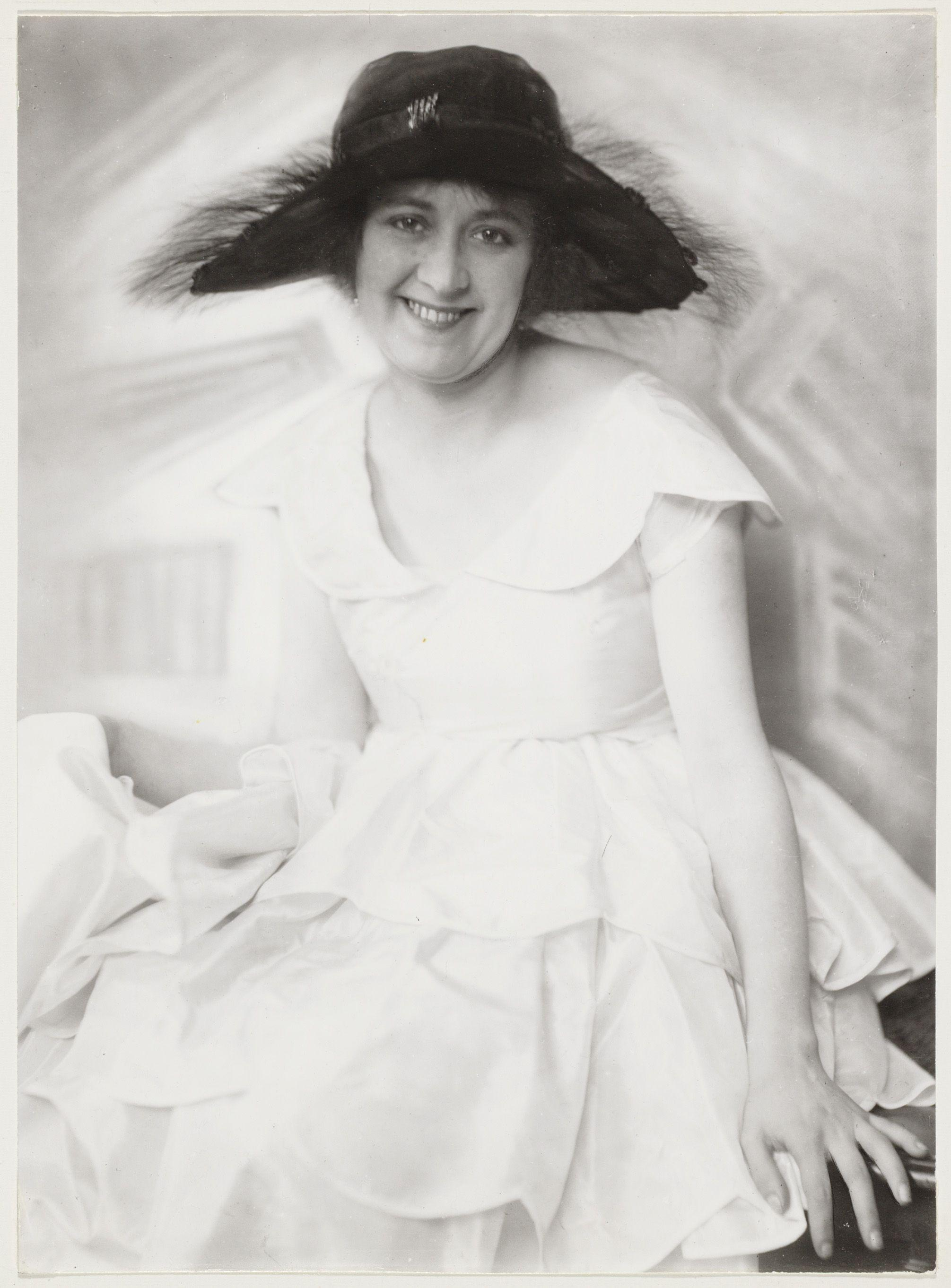 Beschrijving Margie Morris Cabaretière. Documenttype foto Vervaardiger Merkelbach, Atelier J. Collectie Collectie Atelier J. Merkelbach Datering 1918 Inventarissen Afbeeldingsbestand B00000002304 Generated with Dememorixer